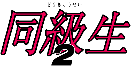 中文（台灣）: 日本十八禁戀愛模擬遊戲《同級生2》題字。